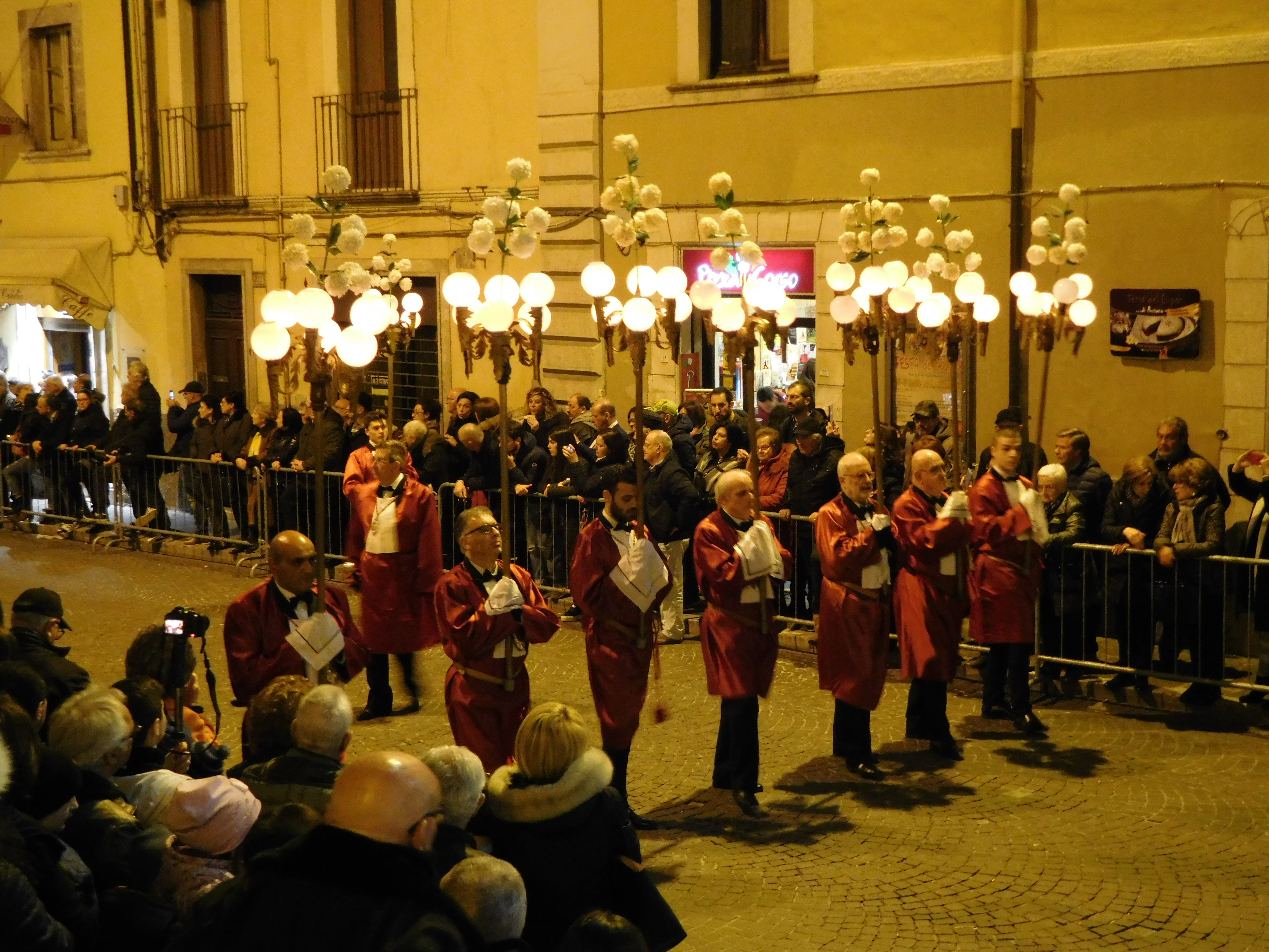 Processione del Venerdì Santo a Sulmona, Italia, Pasqua 2018